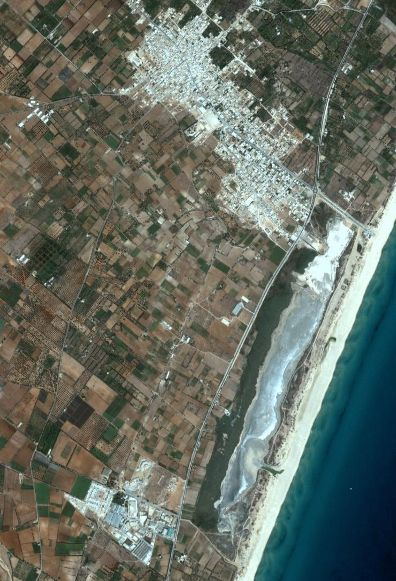 Ville de Tazerka et Sebkha Tazerka, Cap Bon, Tunisie.